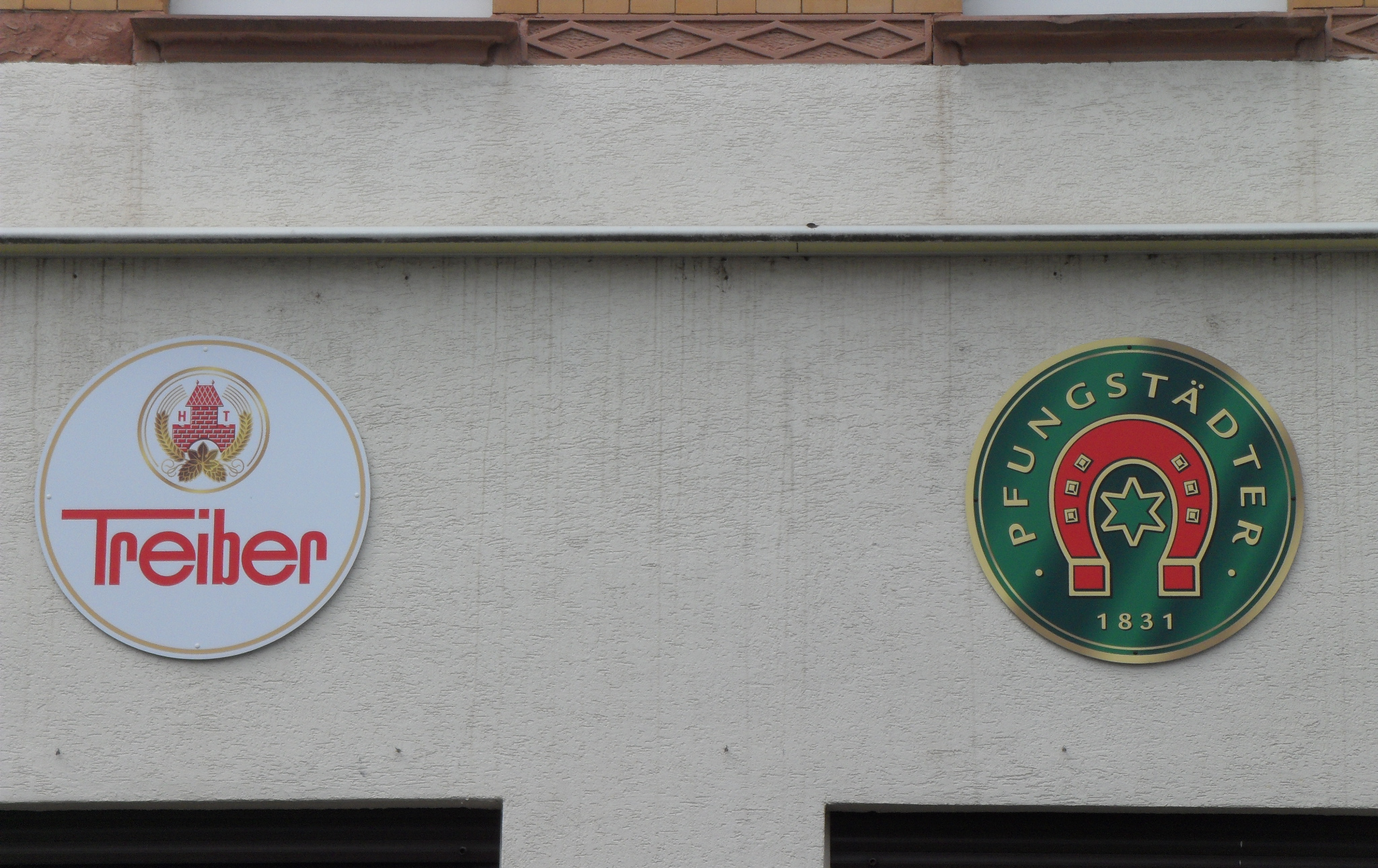 Treiber-Bier und Pfungstädter-Bier-Reklame an der gleichen Gasstätte 2015